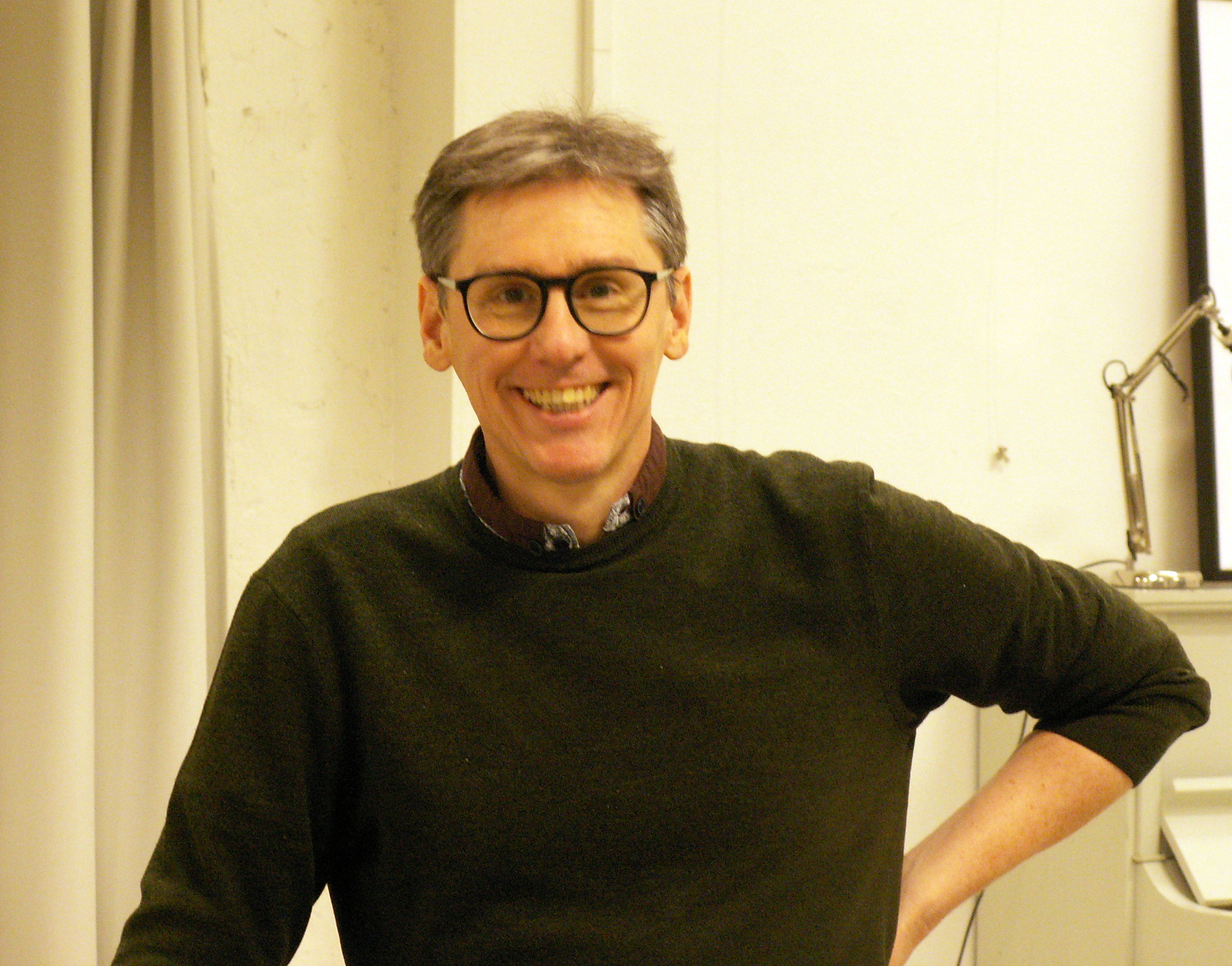 Översättaren och författaren Johan Nilsson, fotograferad på Göteborgs Litteraturhus.